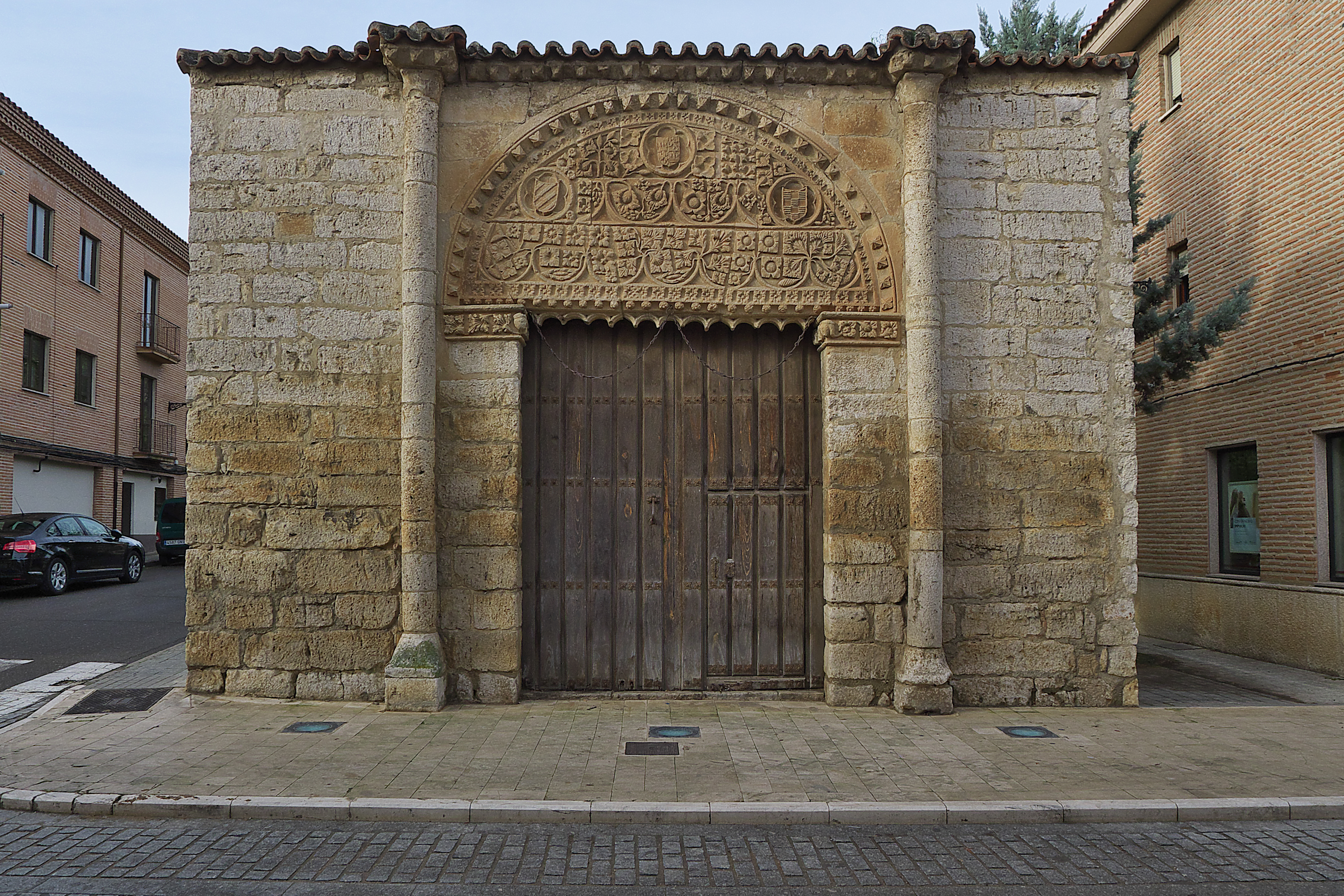 Portada del palacio de Diego de Ulloa y Sosa (s. XV). Único registro del palacio más importante de Toro (Zamora) después del incendio de 1923. En este palacio, residencia regia, se convocaron las Cortes por Fernando II de Aragón (1505), leyéndose el testamento de Isabel I de Castilla donde proclamada heredera a Juana I de Castilla y a Fernando V de Castilla, regente. En la celebración de las Cortes de Toro se promulgaron las célebres ochenta y tres Leyes de Toro, anticipo del moderno Código Civil.